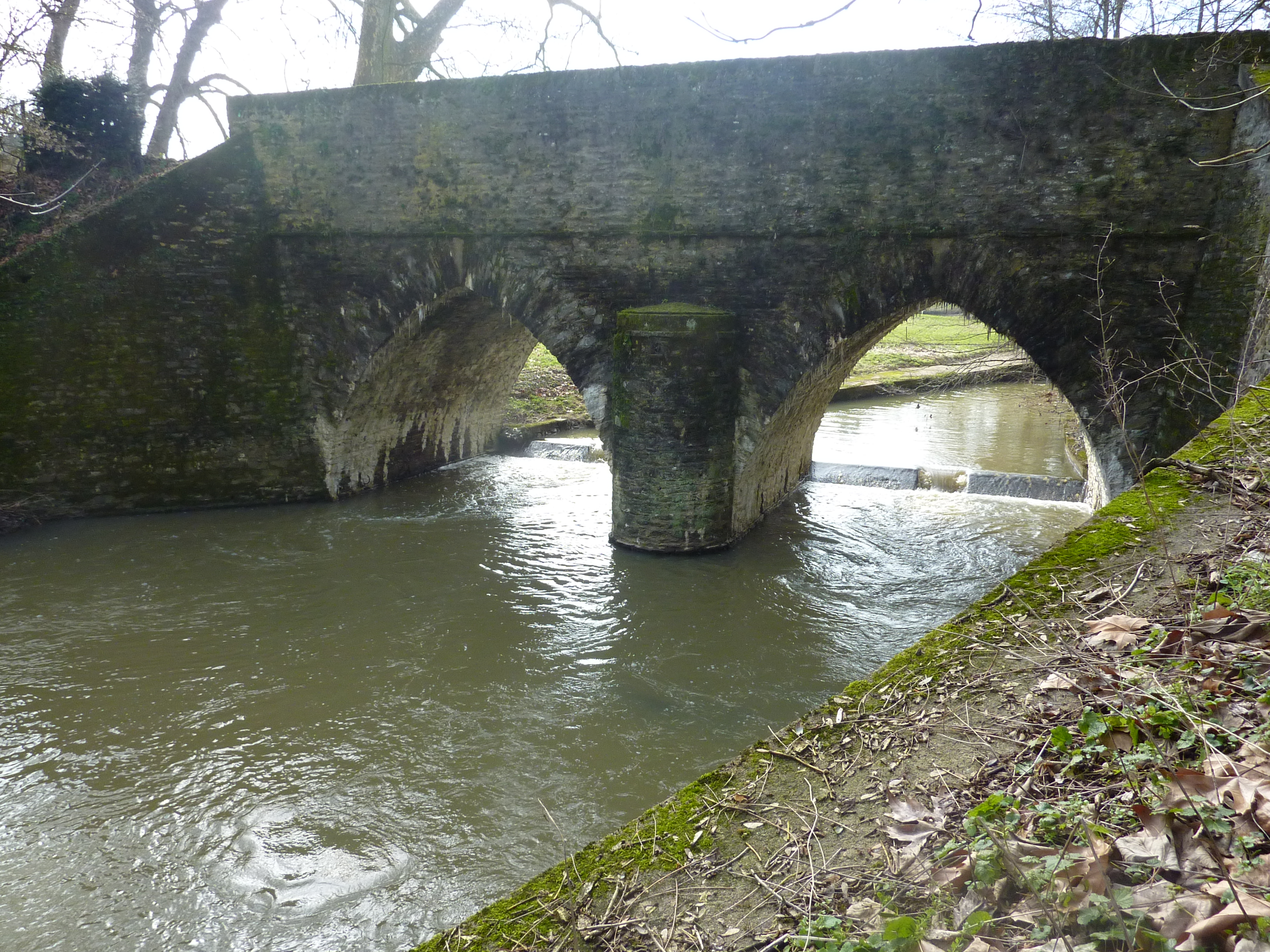 Vue d'ensemble